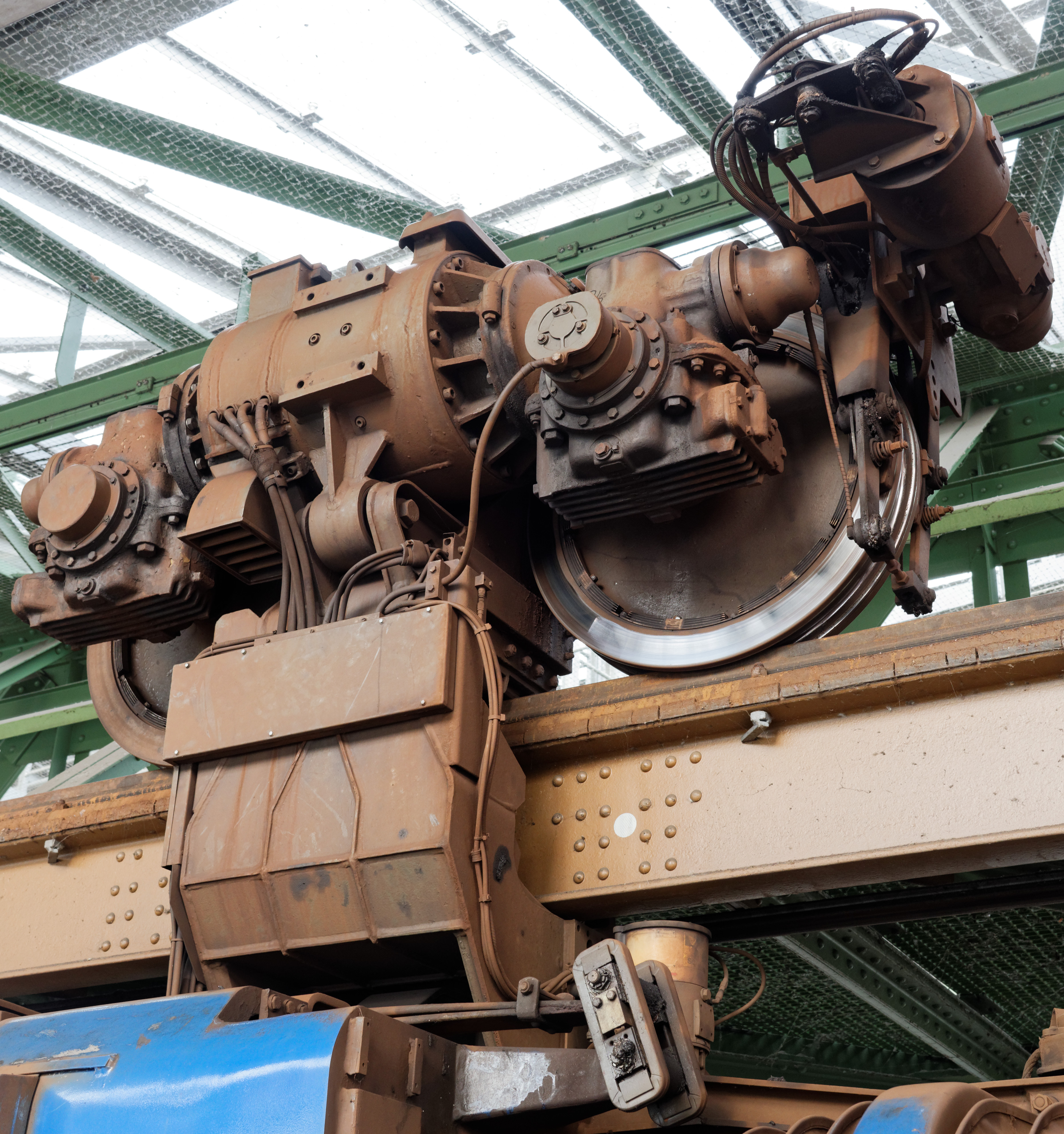 Antriebssatz einer aktuellen Schwebebahn in Wuppertal